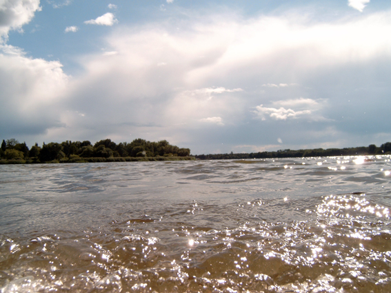 Wendsee, ehemals Kiausee